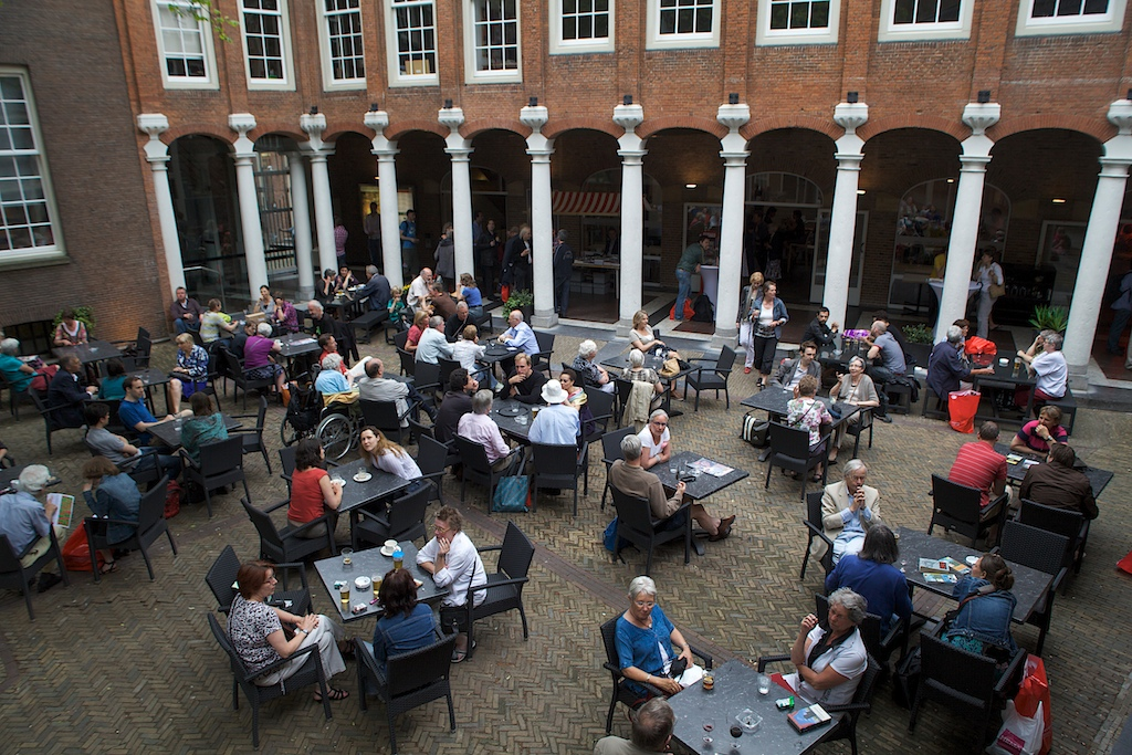 De jongensbinnenplaats anno 2010